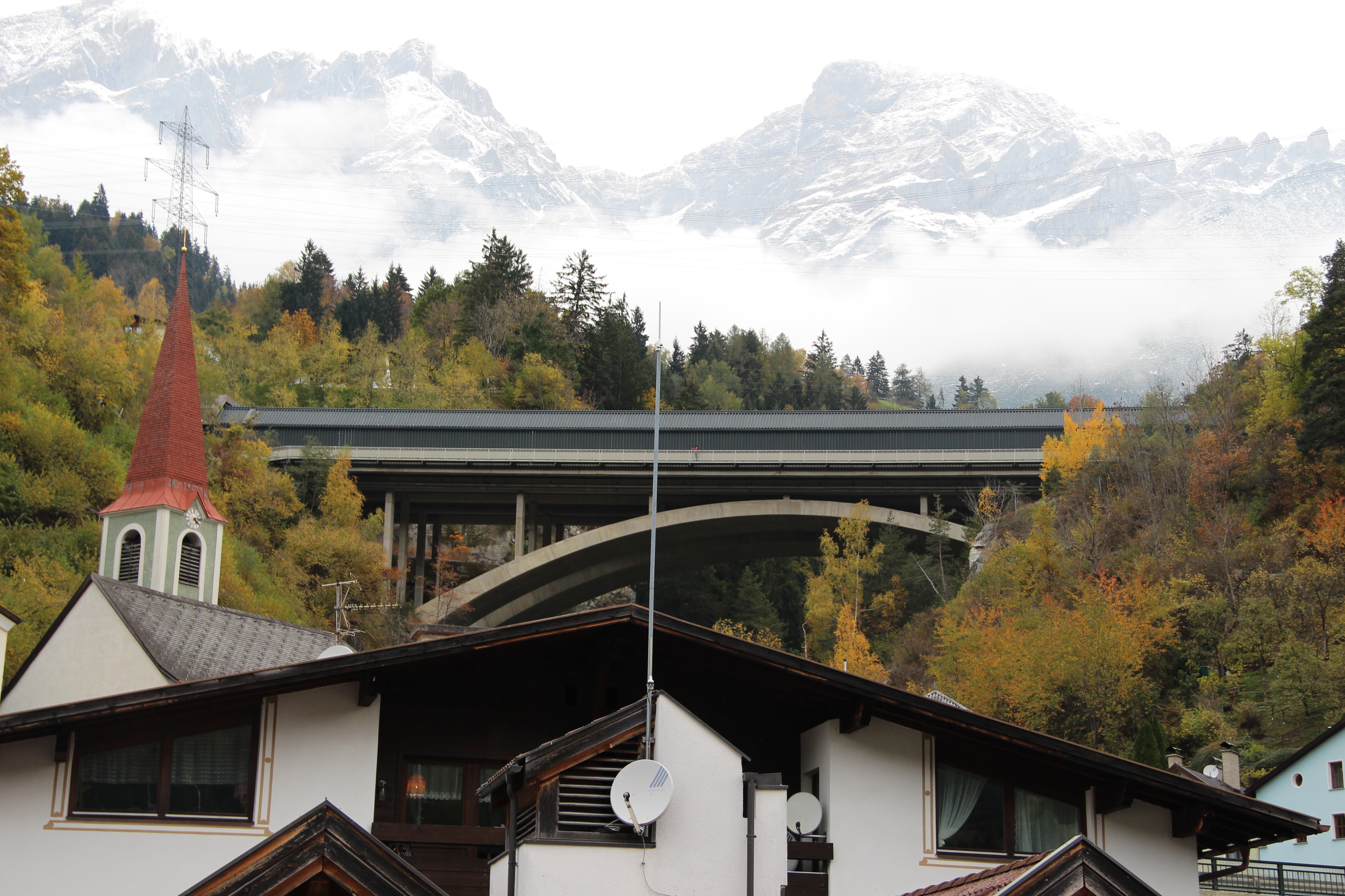 Lattenbachbrücke der Arlberg Schnellstraße S16 über den Lattenbach in Pians, Tirol